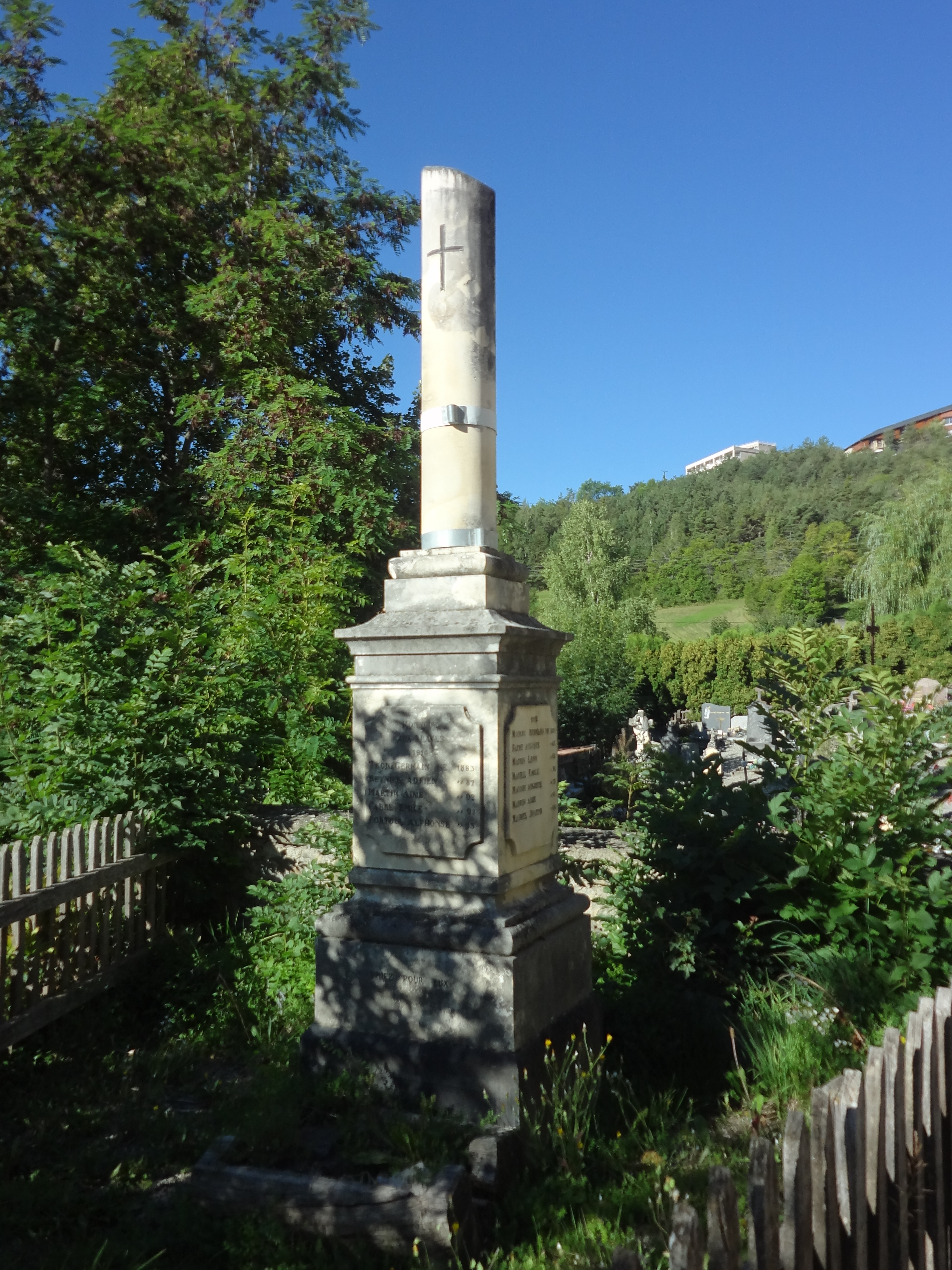 Monument aux morts du village de Rioclar-Haut, (environ 1250 m d'altitude). Commune de Méolans-Revel (Alpes-de-Haute-Provence)